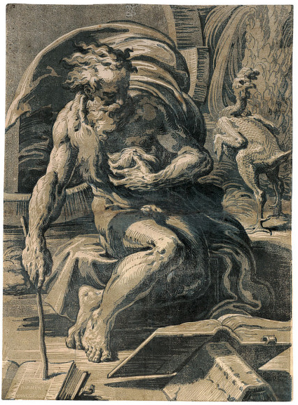 Diogenes. Chiaroscuro woodcut, 19 x 13 7/8 in. (48.3 x 35.2 cm). State i/ii.